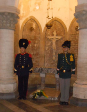 Graf Prins Boudewijn met Guard of Honour